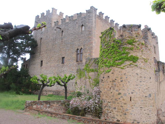 Castell de Vilassar al Maresme - Catalunya